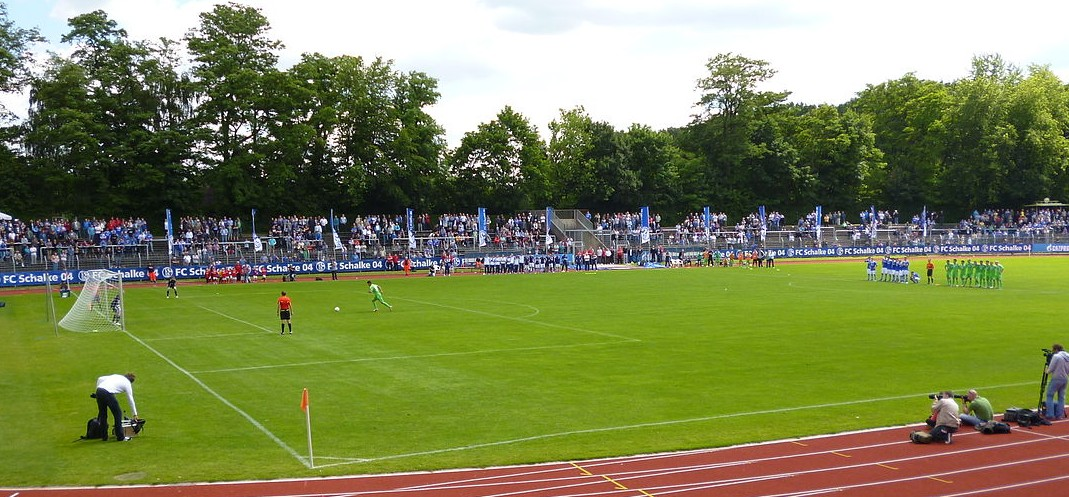 Elfmeterschiessen Schalke-Wolfsburg